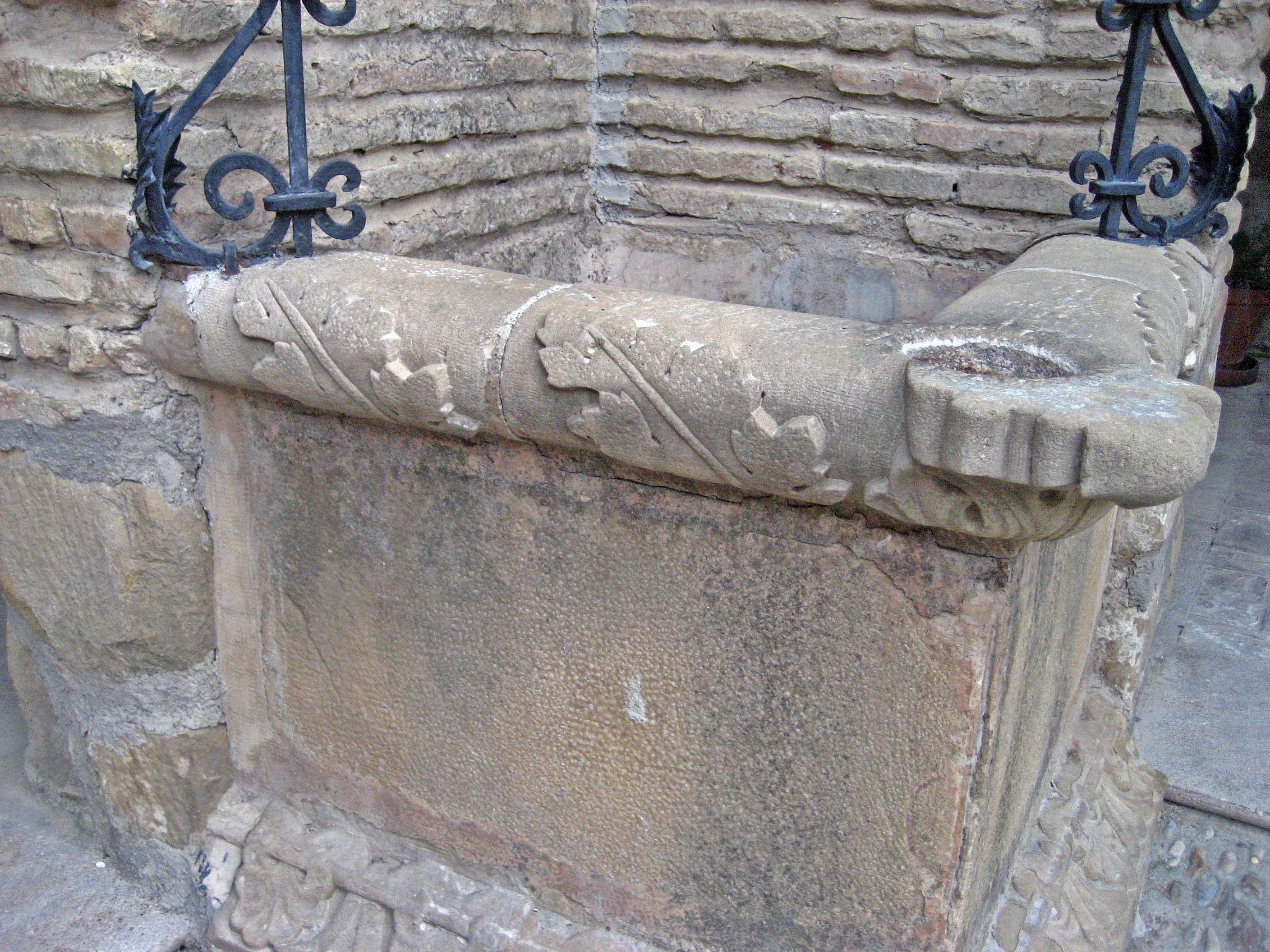 Brocal de pozo en el Palacio de Mengíbar, en dicha población província de Jaén (Andalucía) Esdpaña.